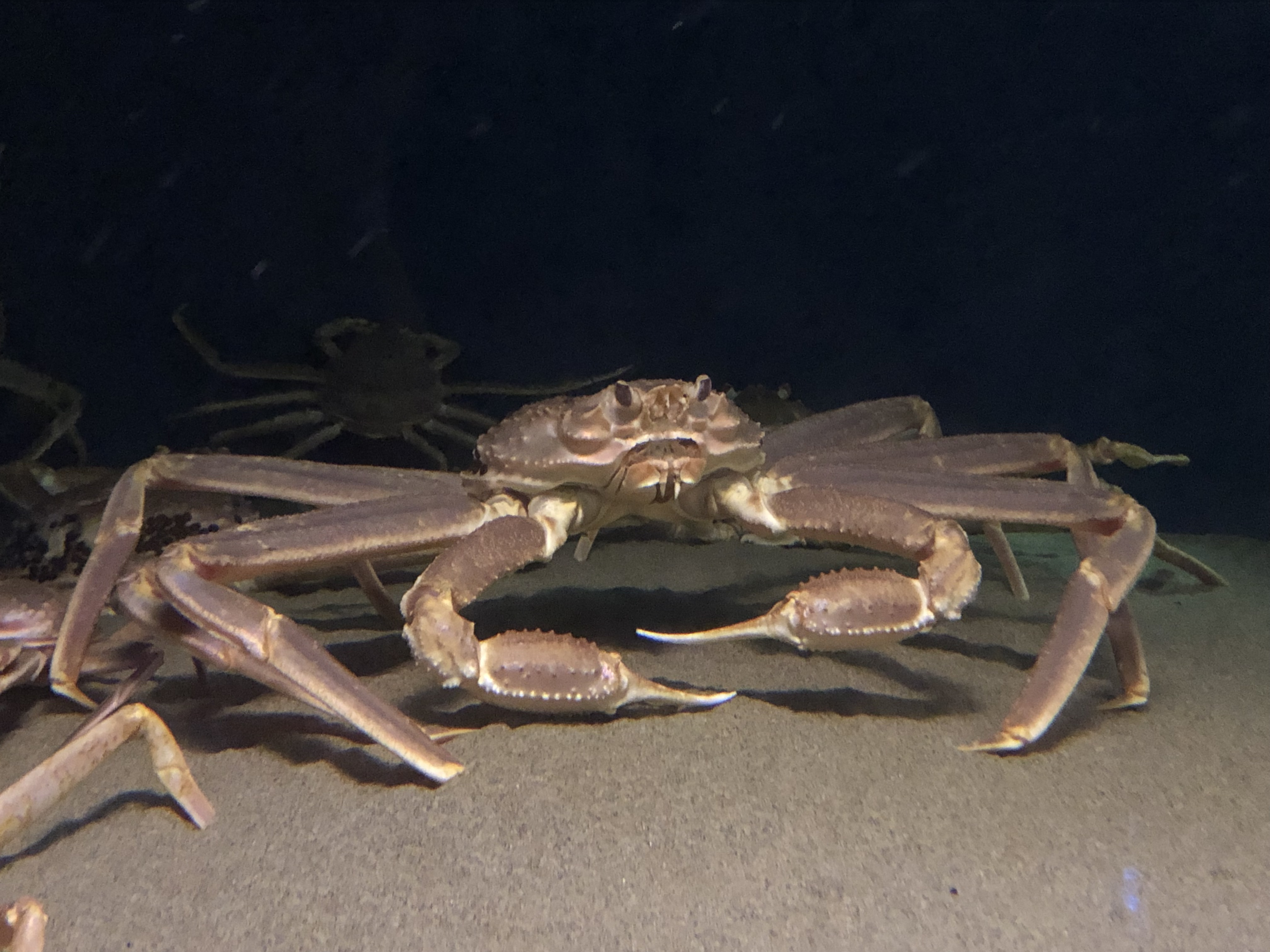 かにっこ館飼育のja:ズワイガニ